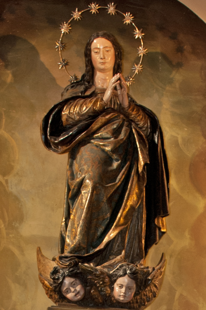 Inmaculada, autor: Alonso Cano, Iglesia de San Julián, Sevilla.